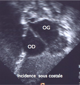 Echo 2D du FO chez un nourrisson de 7 mois